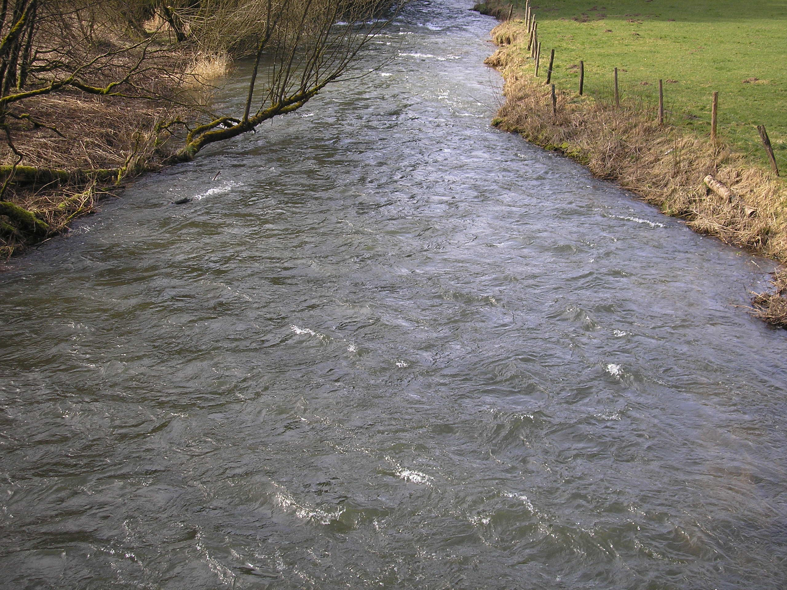 River Warche near Butgenbach, East Belgium, Warchetal bei Bütgenbach